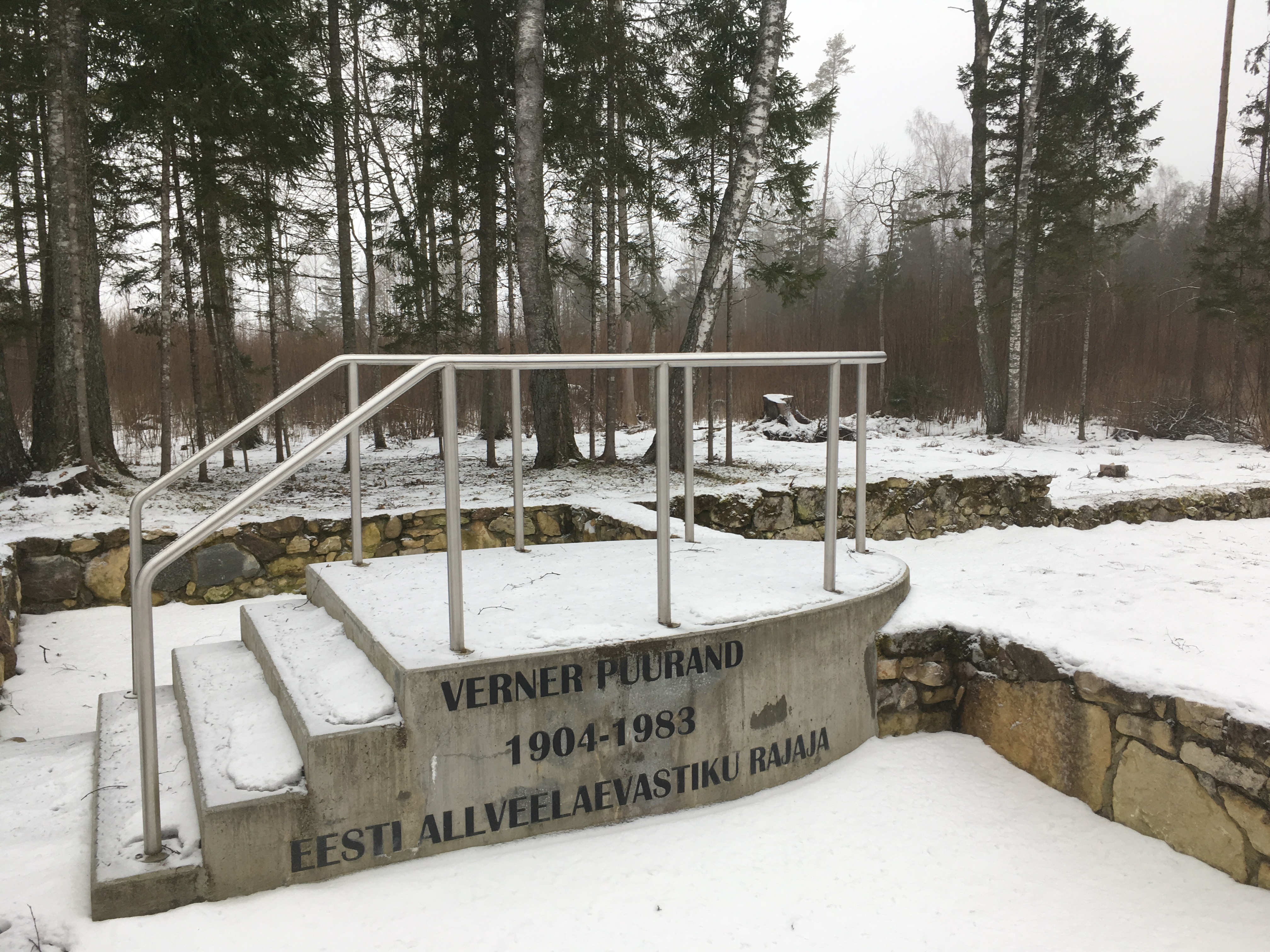 Mälestusmärk on rajatud kapteni kunagise kodumaja taastatud vundamendile. Raudbetoonist monument ehitati kohaliku omavalitsuse, Kaitseministeeriumi ja Hans Puuranna toetusel kunagise korstnajala peale ja kujutab endast stiliseeritud allveelaeva komandosilda.